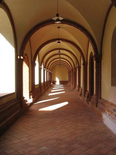 Kloster Lehnin, Brandenburg, Kreuzgang